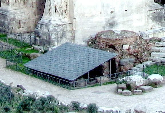 Abri recouvrant les vestiges de l'autel de Saturne.